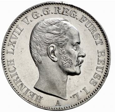 Heinrich LXVII.. Münzporträt auf einem Vereinstaler aus dem Jahre 1858.